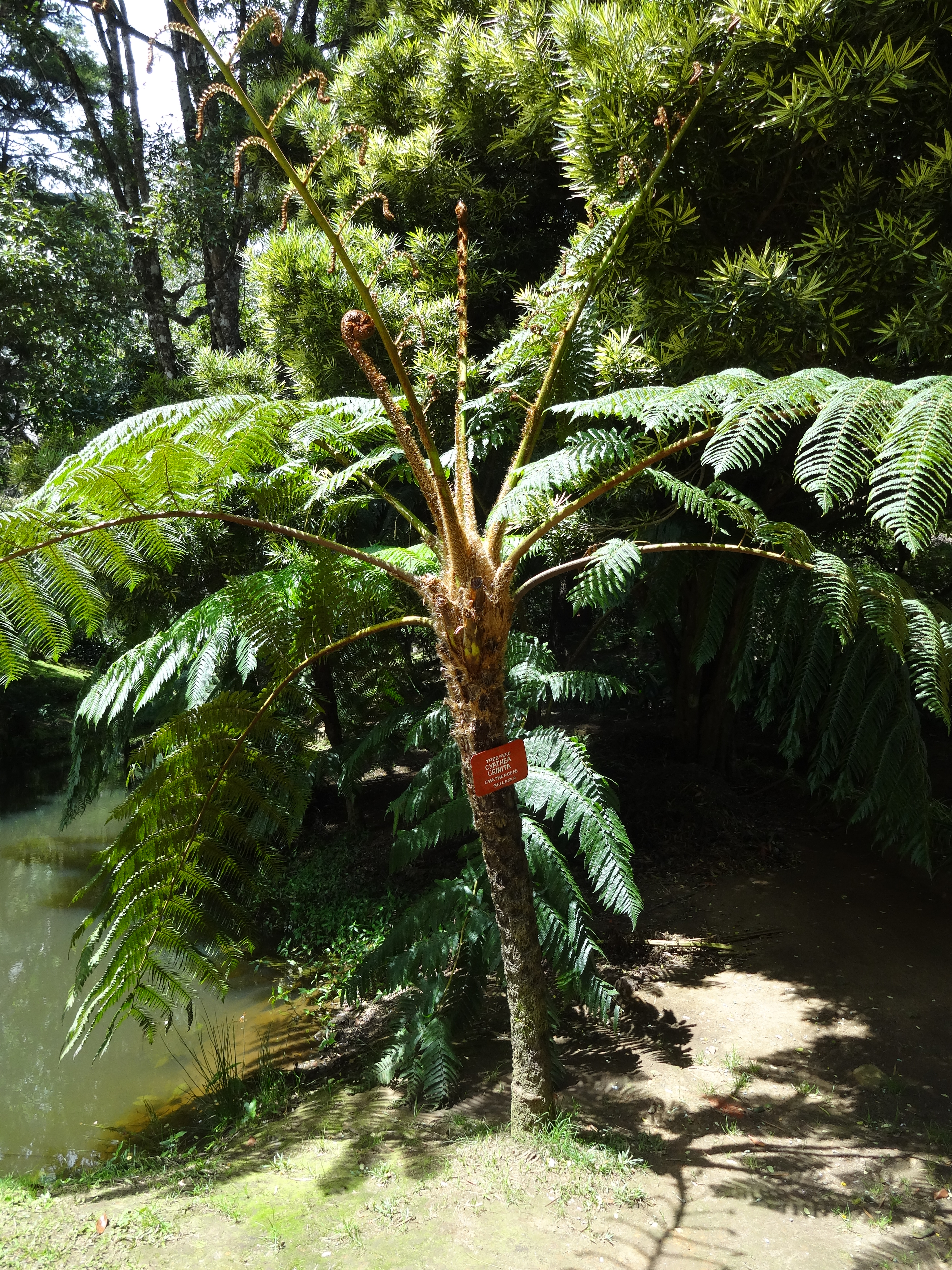 Cyathea crinita in Hakgala Botanical Garden